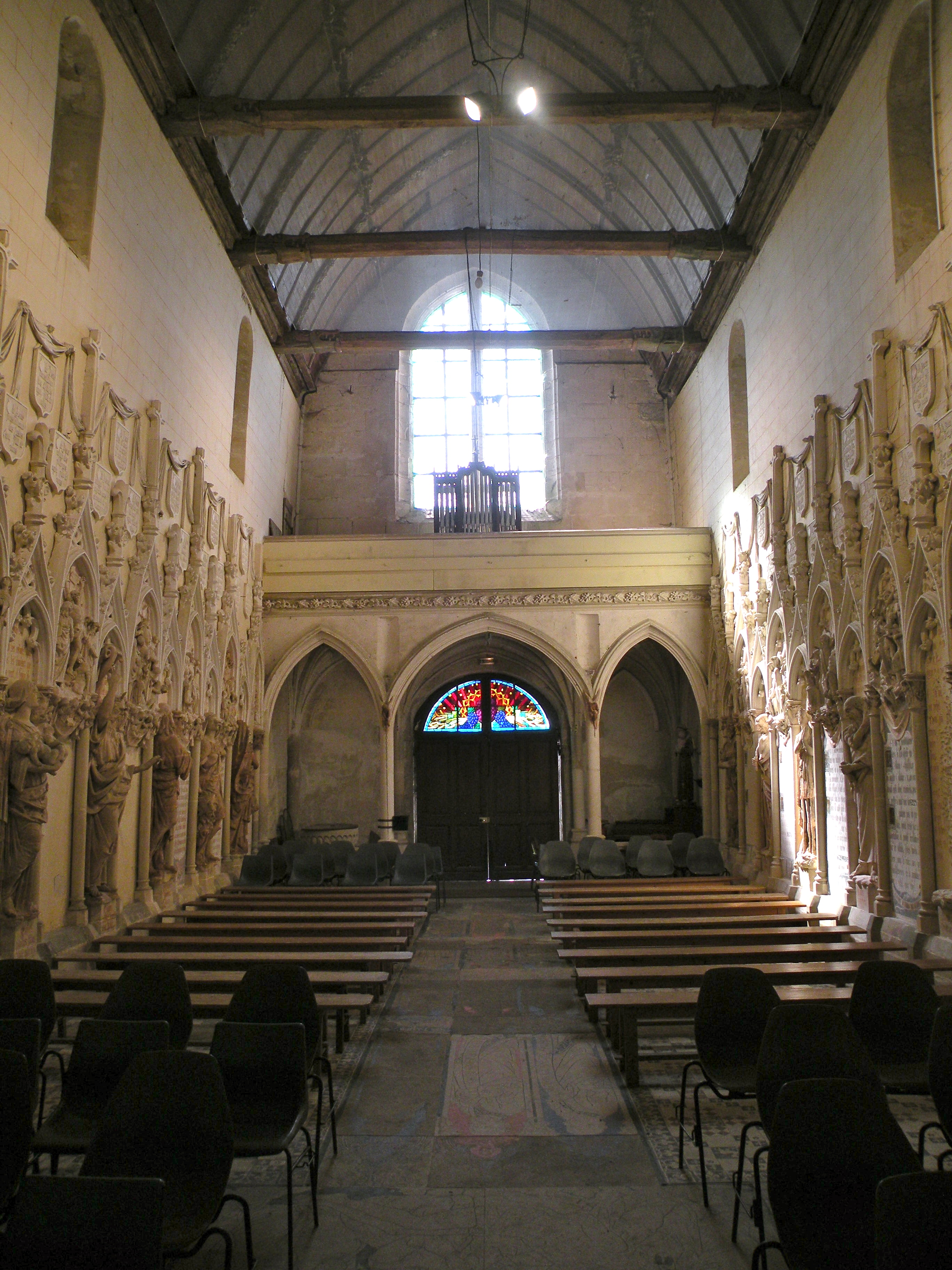 Église Saint-Martin d'Amblainville, nef, vue vers l'ouest.